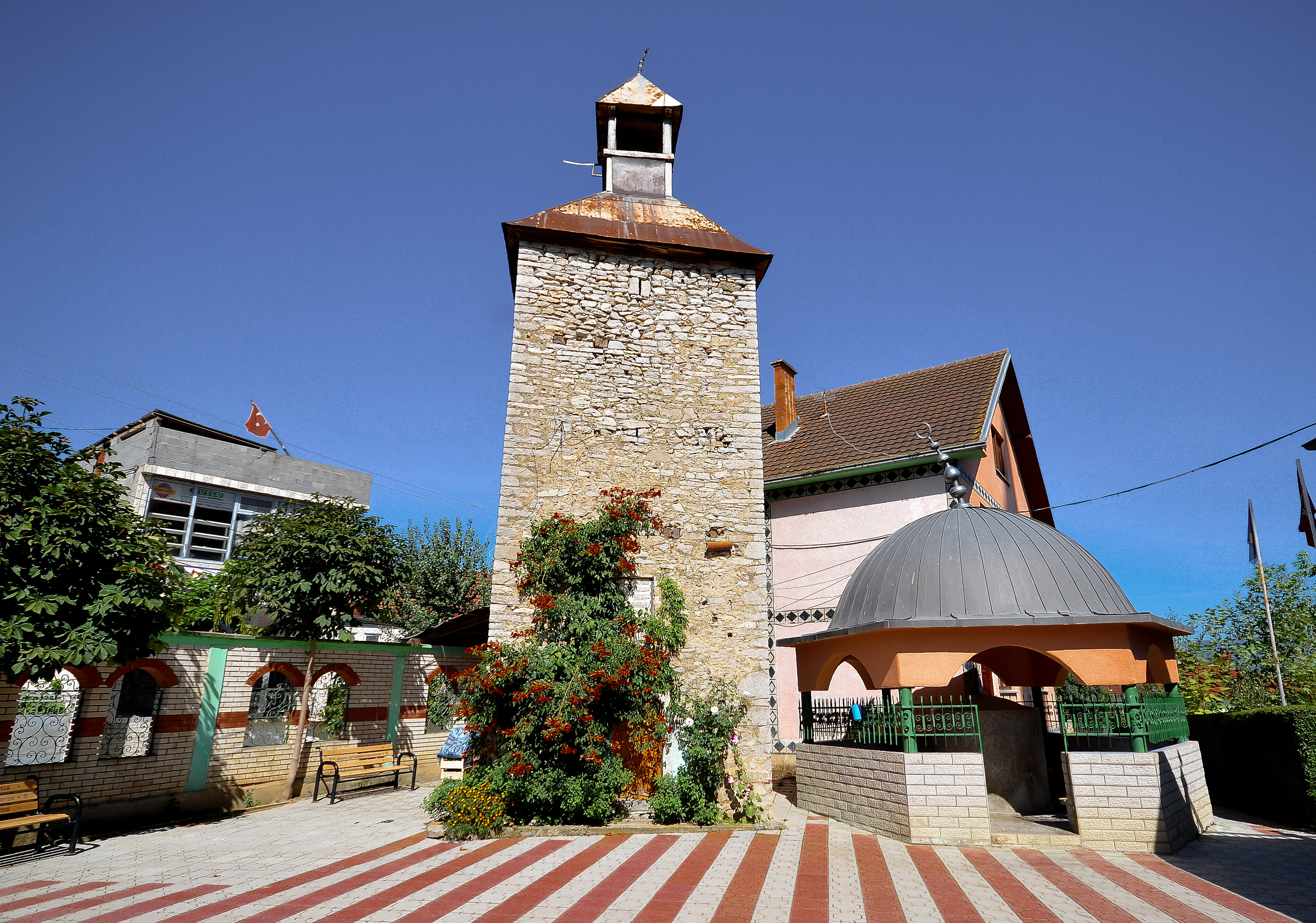 Sahat Kulla E Mahmud Pashës